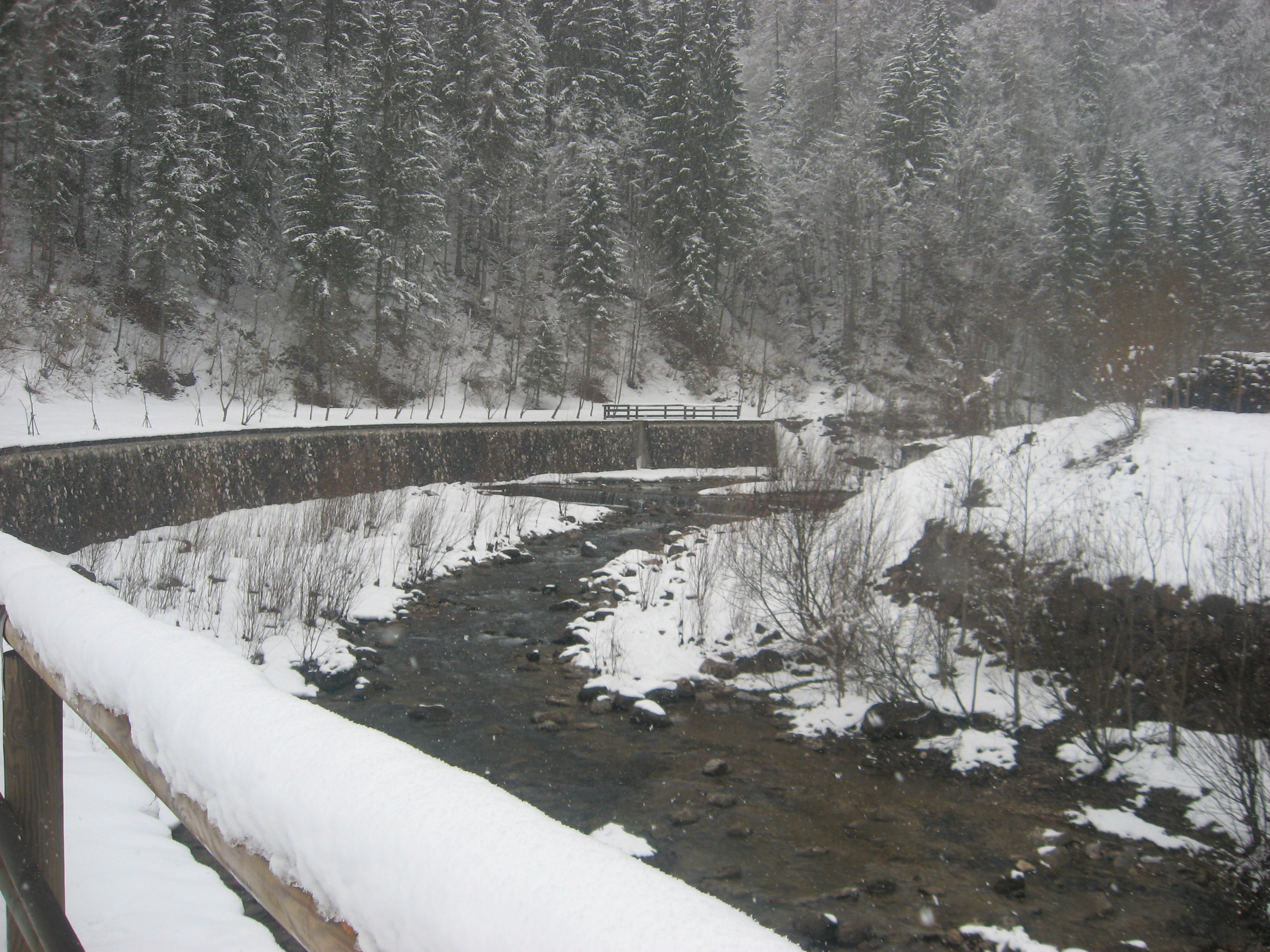 In Extremo, il torrente Maè in località Dont di Zoldo